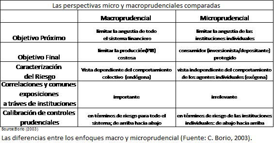 Es la versión en español de la regulación macroprudencial